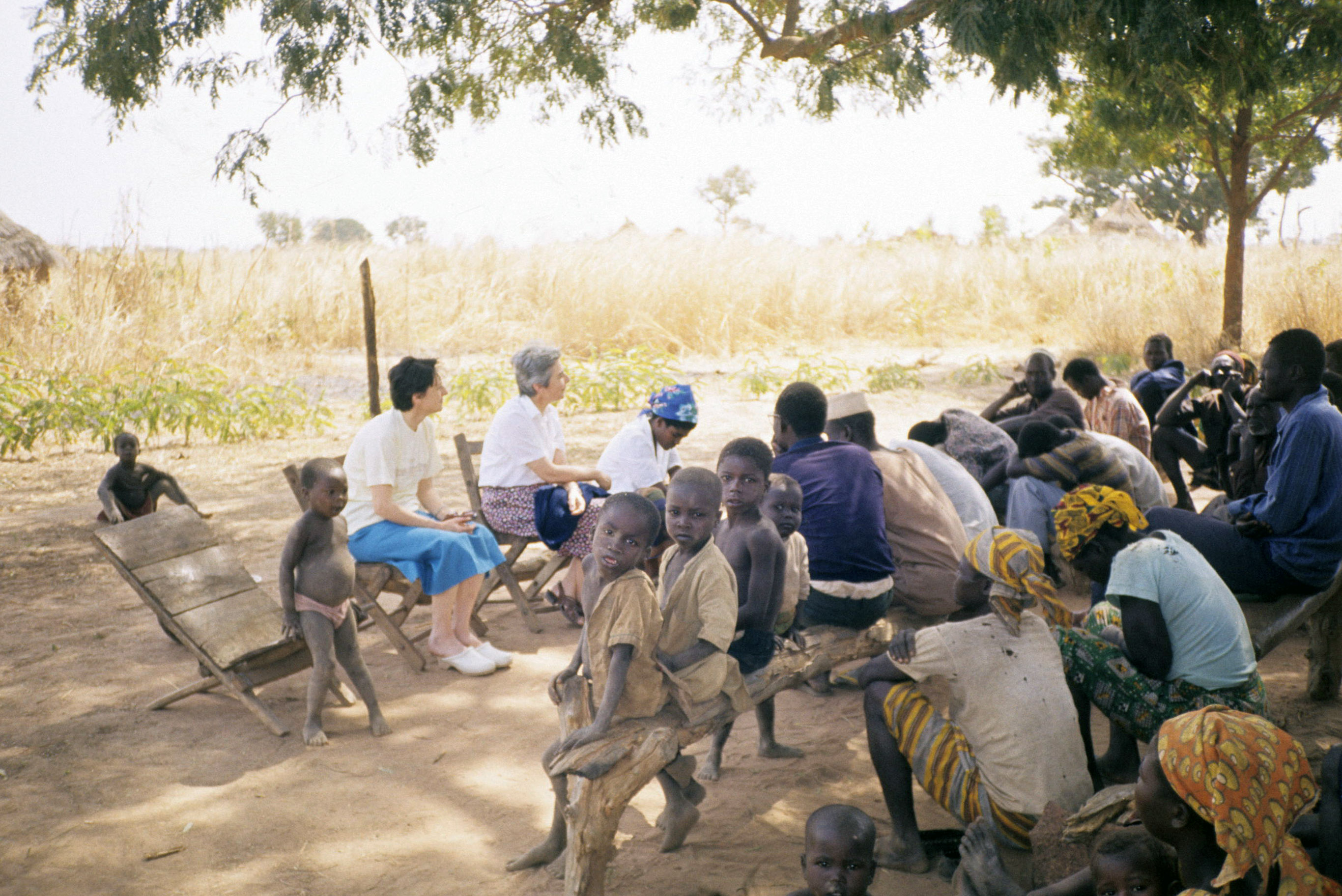 Foto personale in Ciad 1998